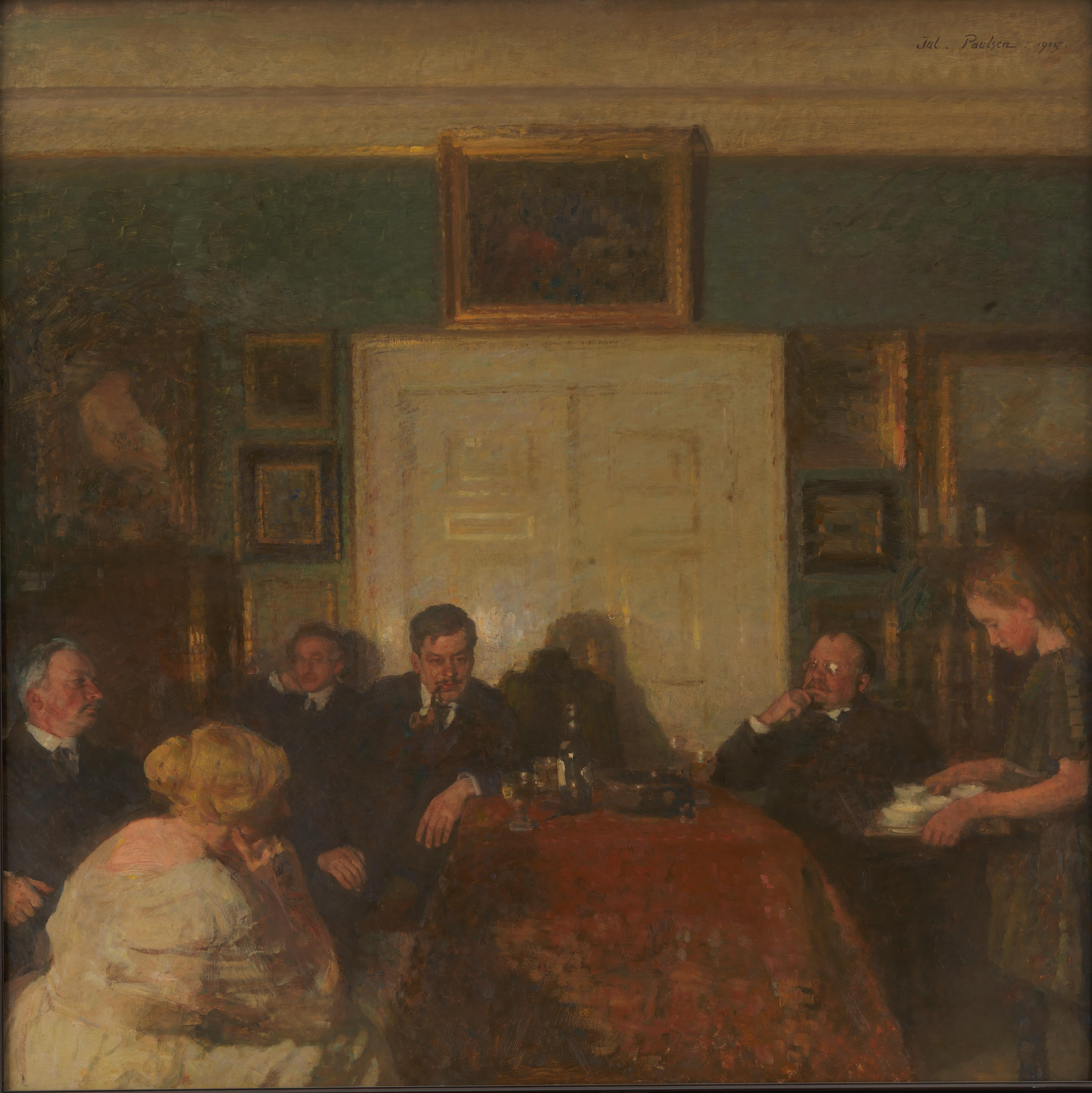 Julius Paulsen (1860-1940), Aftenselskab i kunstnerens hjem, 1915 På billedet ses fra venstre: maleren Vilhelm Hammershøi, kunstnerens hustru Esther Paulsen, f. Lange, forfatteren Louis Levy, arkitekt Hans Koch, forfatteren Sven Lange og kunstnerens datter Inger (senere gift med billedhuggeren Hugo Liisberg).